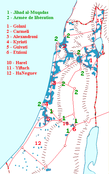 Ordre de batailles des forces juives, arabes palestiniennes et arabes en avril 1948.